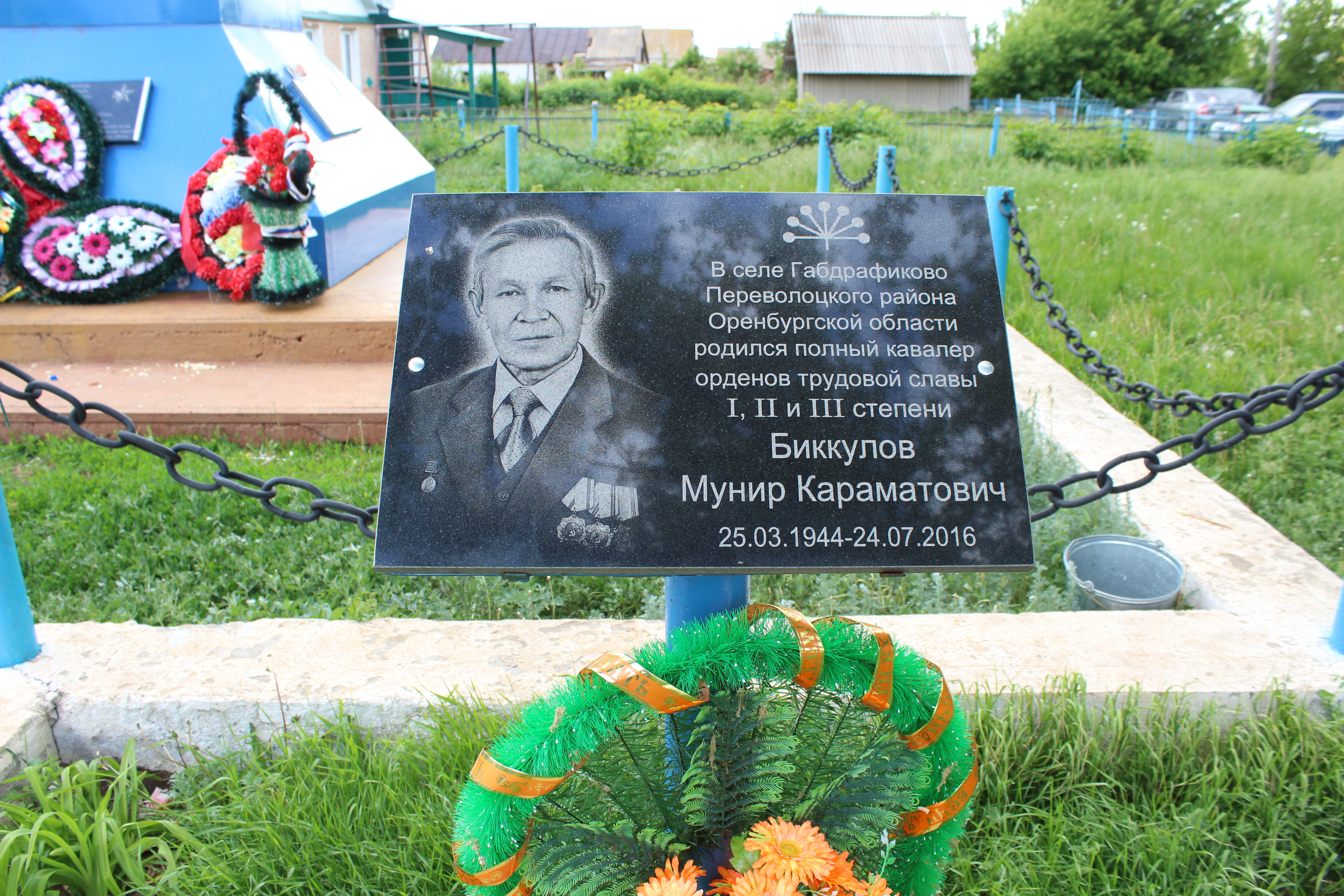 Башҡортса: Ғәбдрәфиҡ ауылында Мөнир Бикҡоловтың мемориаль таҡтаташ